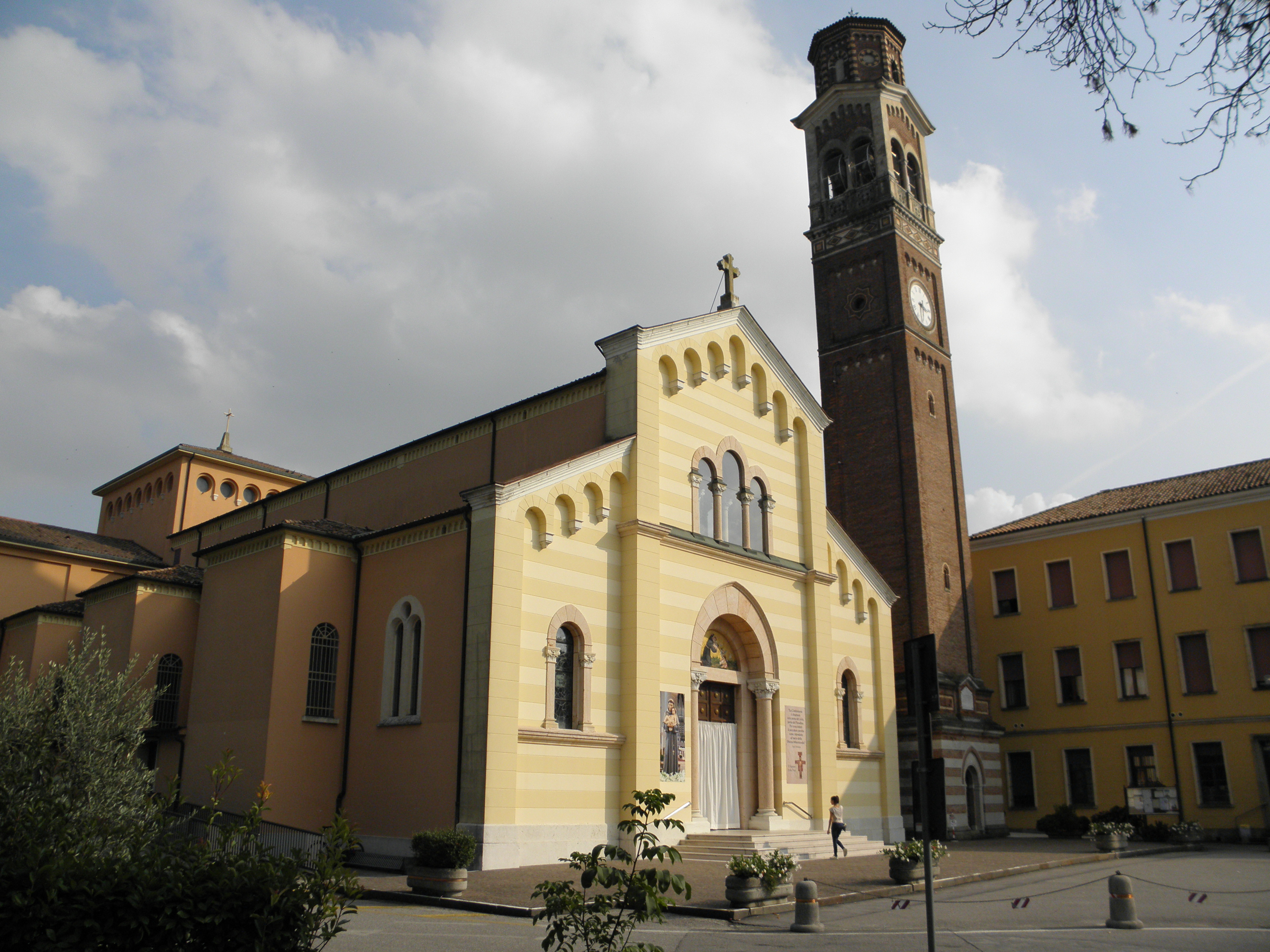 Camposampiero, la chiesa dei Santi Giovanni Battista e Antonio, meglio nota come santuario della Visione.